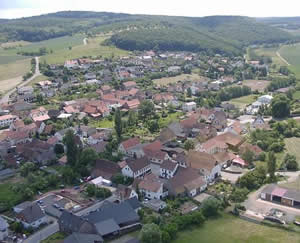 Ein Luftbild von Breunigweiler, zur Verfügung gestellt von Albert Koch.